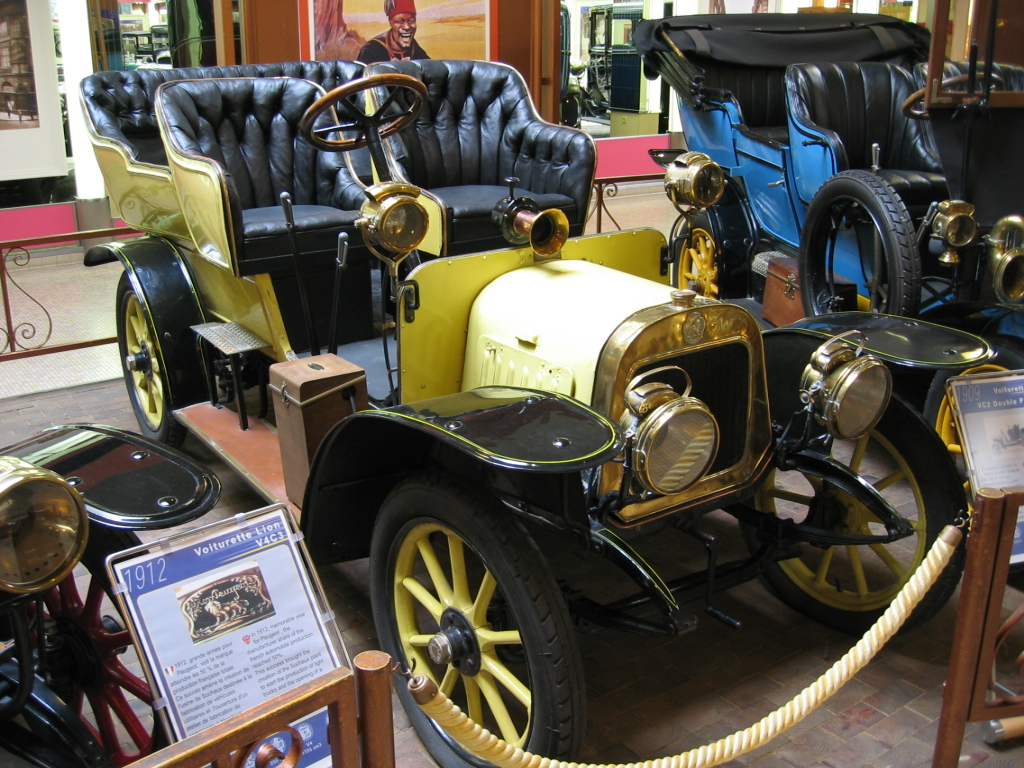 Peugeot Lion VC2 de 1909 - Musée Peugeot Sochaux